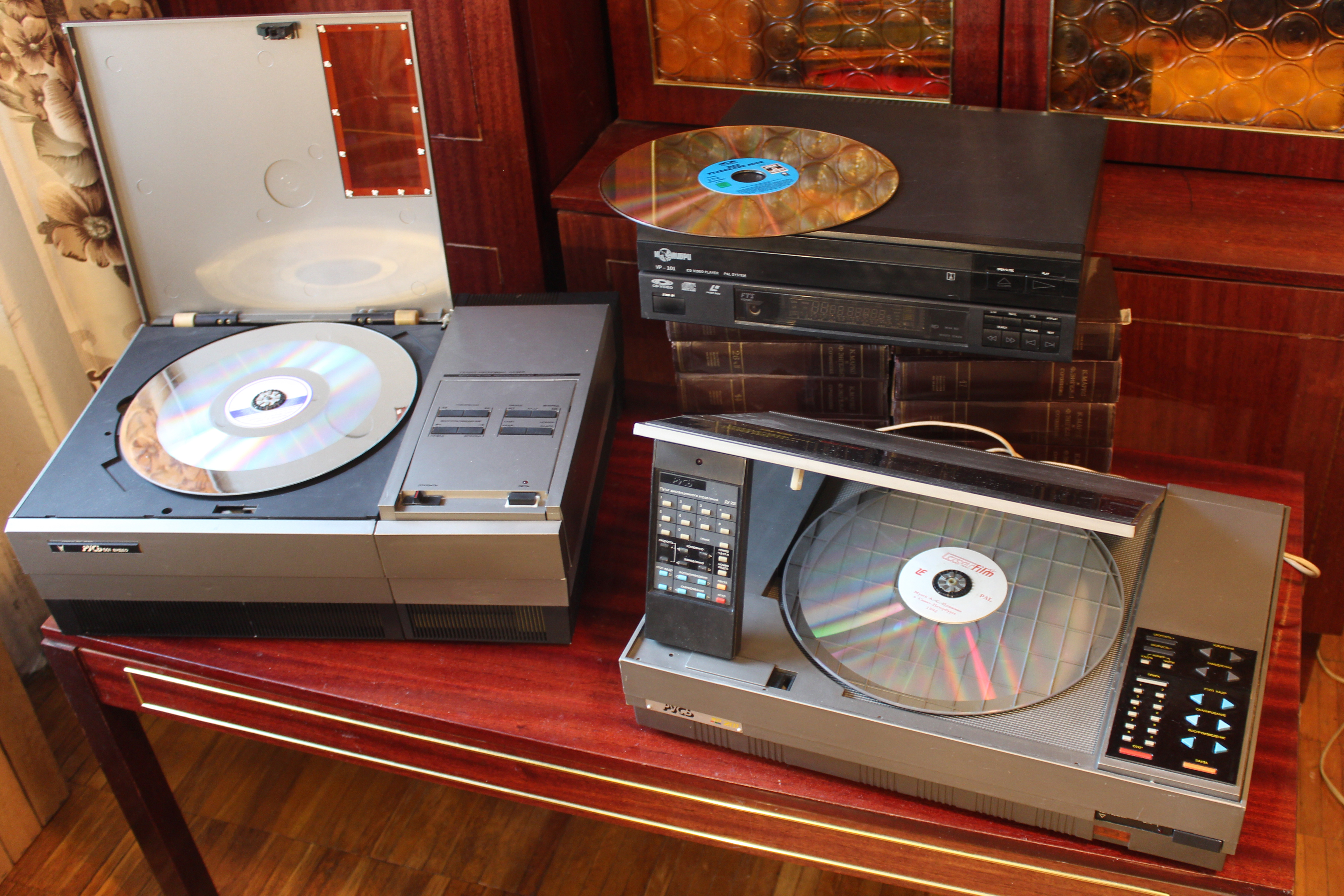 Лазерные видеопроигрыватели отечественного производства: "Русь-501 ВИДЕО", "Русь ВП-201", "Колибри ВП-101".